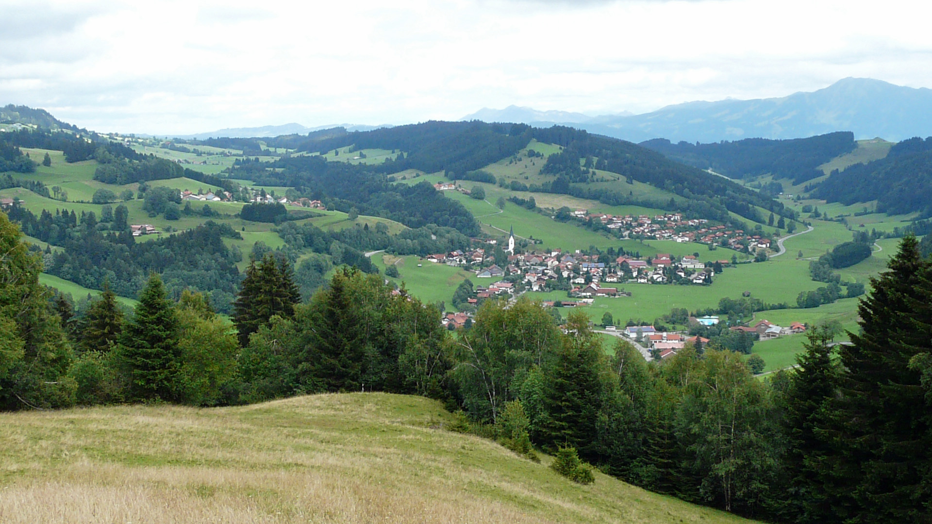 Missen vom Ochsenberg, Missen-Wilhams